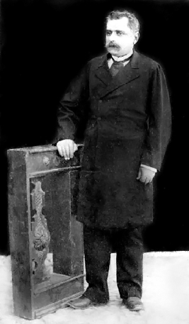 Первооткрыватель Кносского дворца Минос Калокеринос (1843 - 1907)